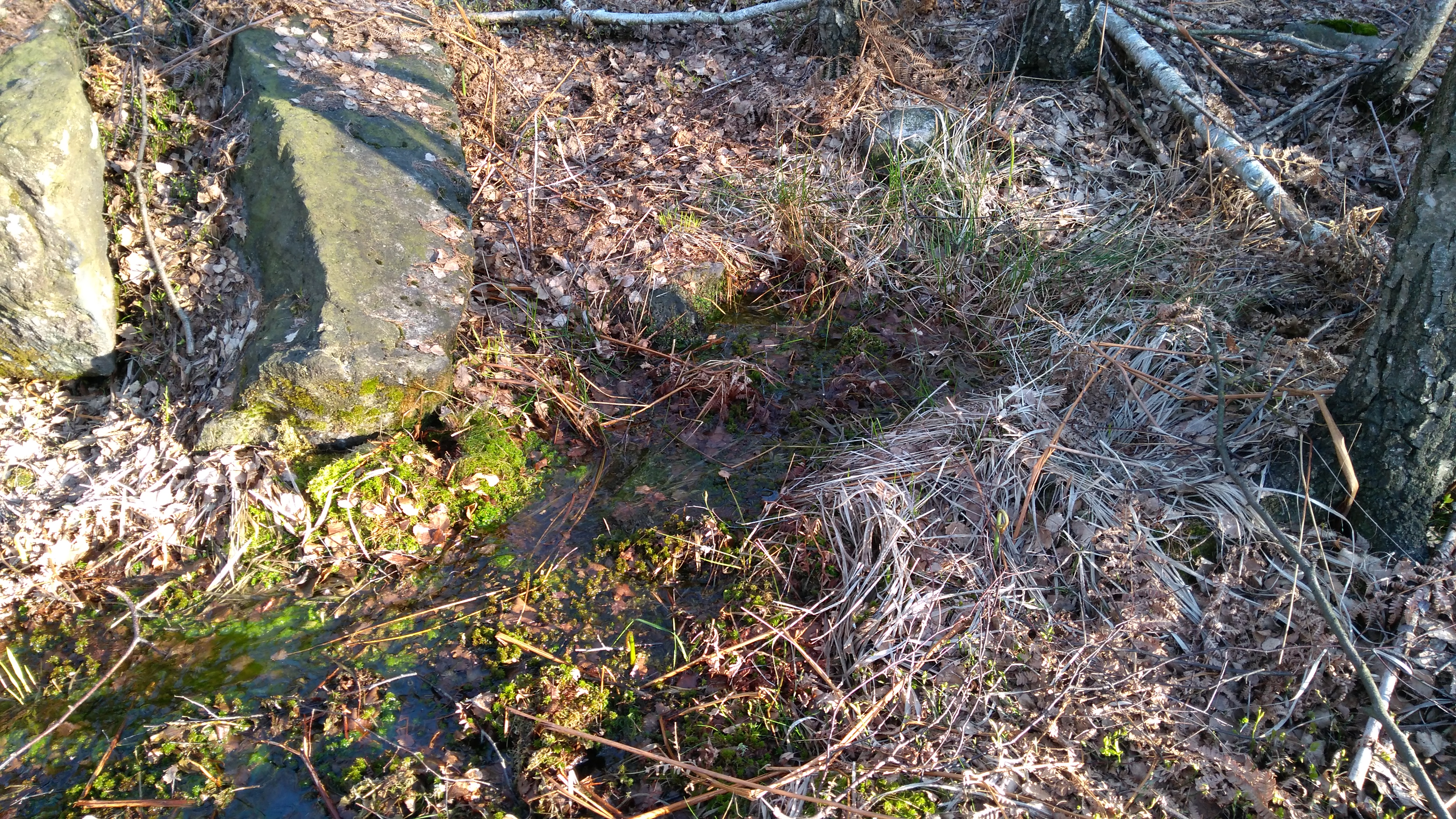 Potok.